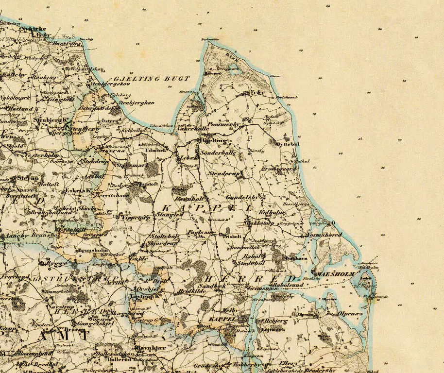 Generalstaben Videnskabernes Selskab: Kaart over Slesvigs Fastland og Als 4, østre blad, udsnit